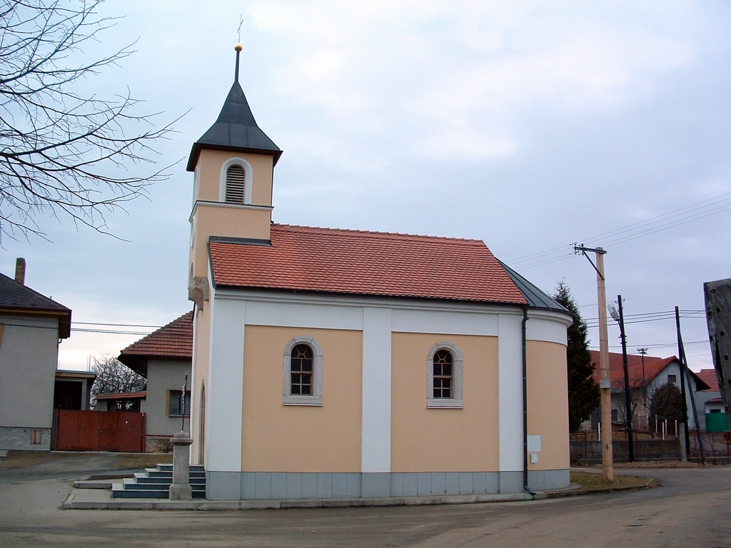 Kaple ve Chmelné z východní strany